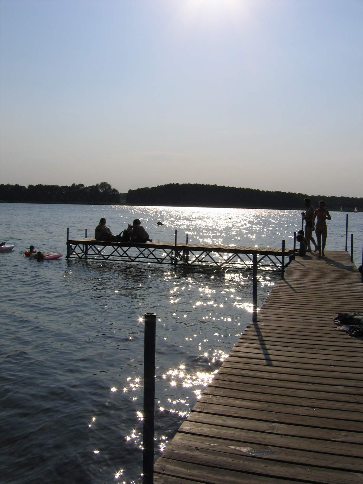 Kąpielisko niestrzeżone nad Jeziorem Powidzkim w Giewartowie, koło bazy nurków, Giewartów.